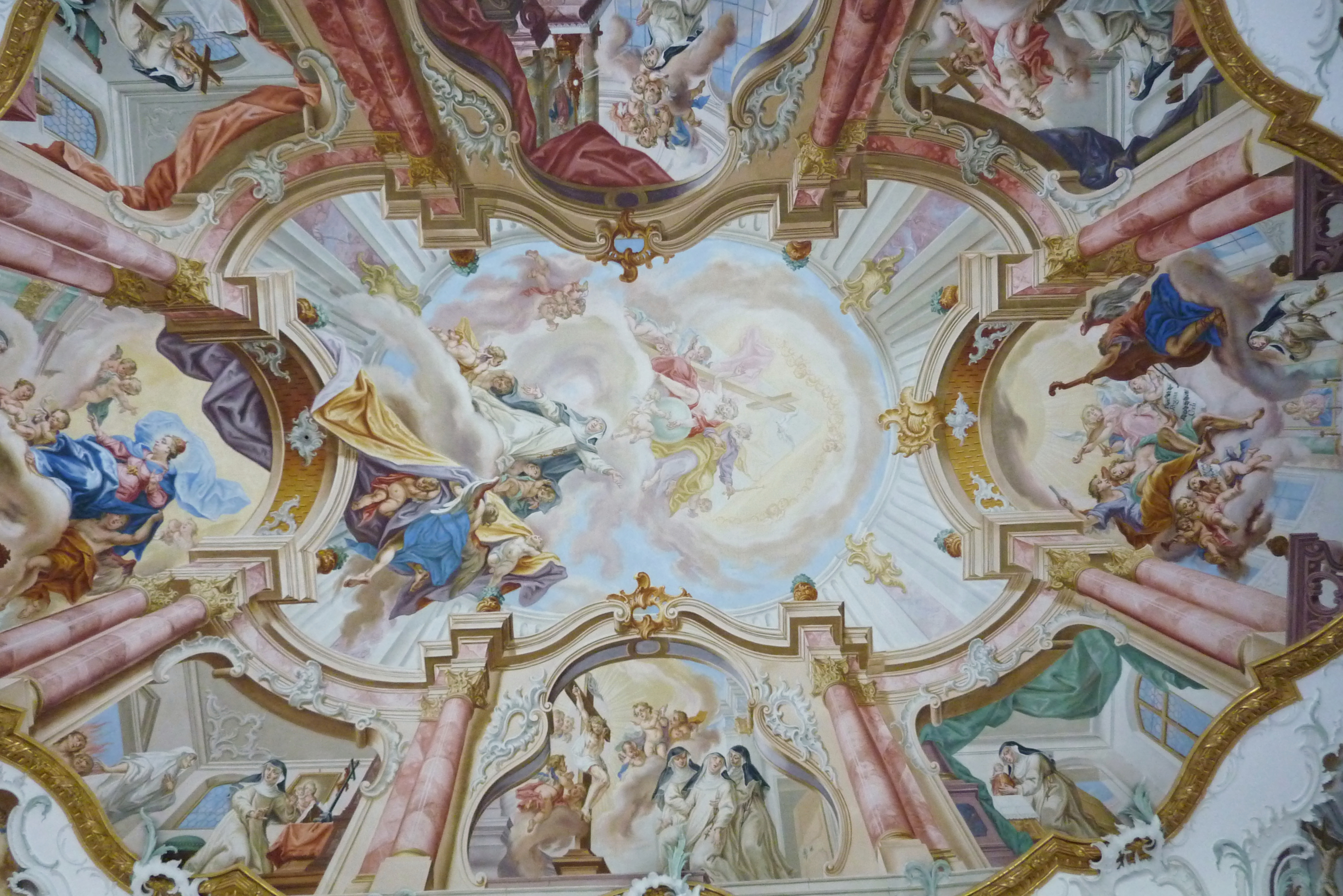 Klosterkirche Maria Medingen (Mariä Himmelfahrt) in Mödingen (Landkreis Dillingen an der Donau) des ehemaligen Dominikanerinnenklosters (heute Provinz Maria Medingen der Dillinger Franziskanerinnen), Deckenfresko in der Ebnerkapelle von Vitus Felix Rigl (1755), Darstellung: zum Himmel geöffnete Arkadenhalle mit Margareta Ebner und der Dreifaltigkeit in der Mitte